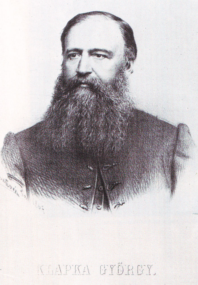 Klapka György (Marastoni József litográfiája – 1857)